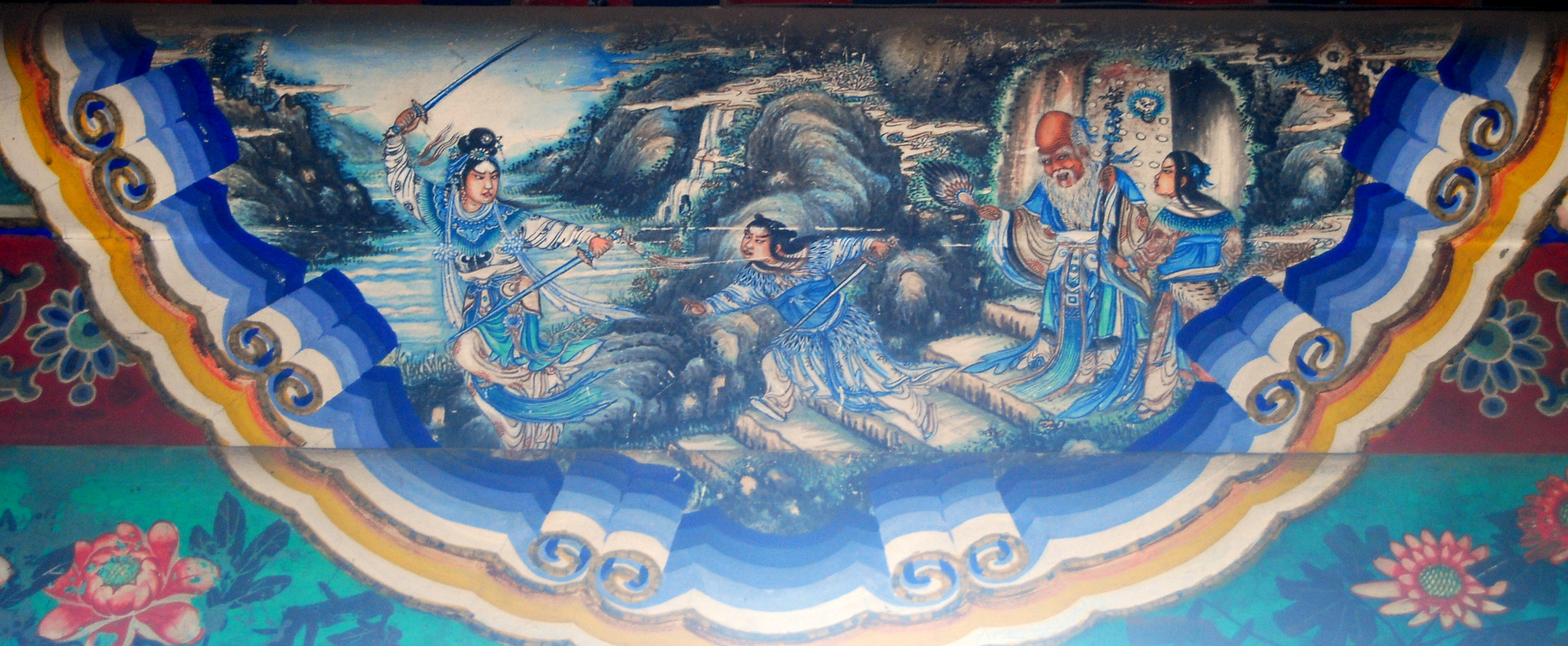 颐和园长廊彩绘：盗仙草 （白蛇传故事）